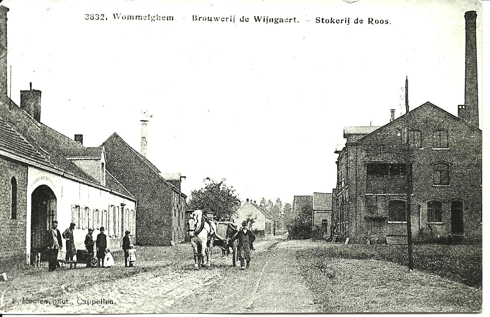 foto begin 20ste eeuw